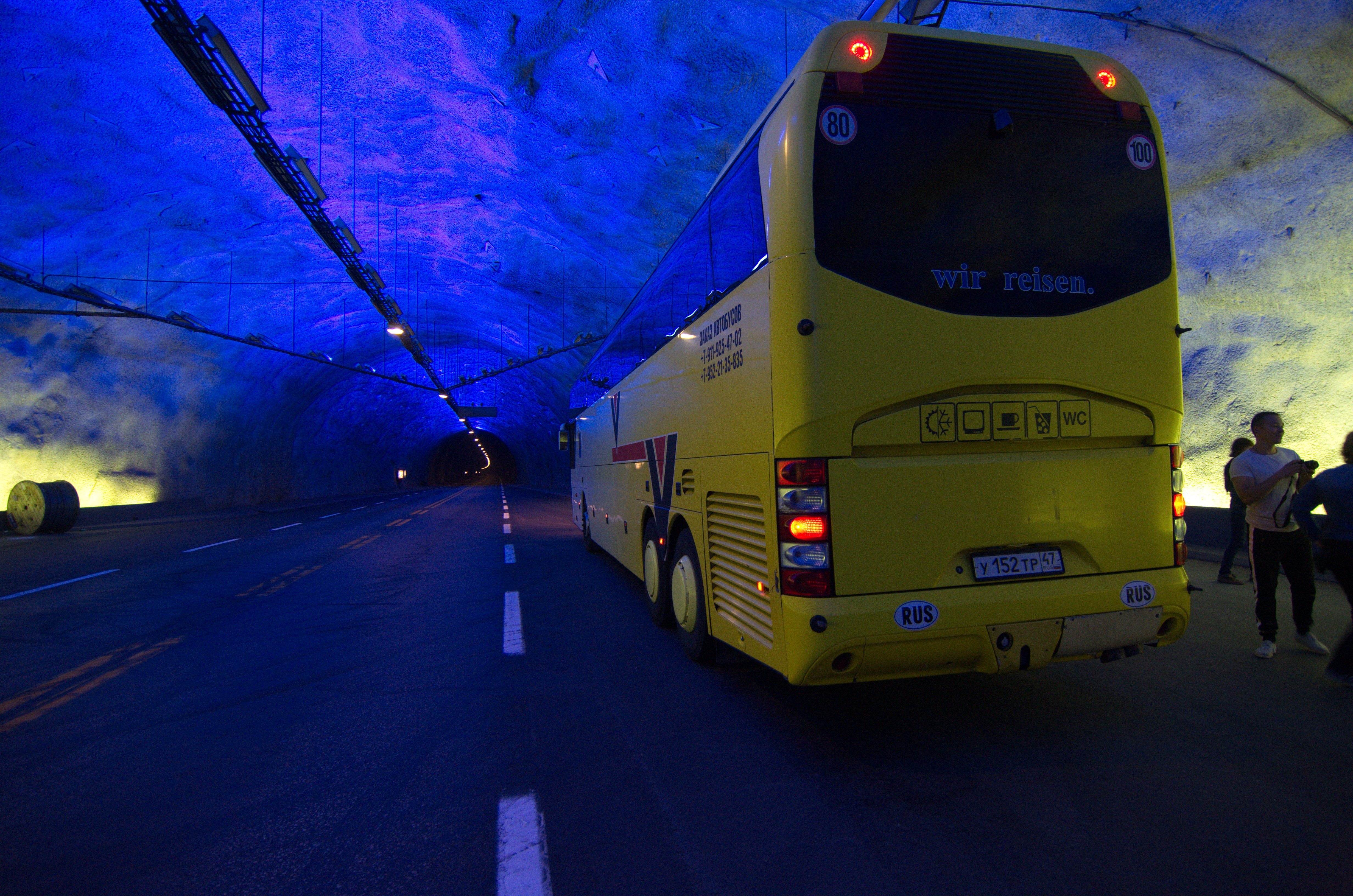 Автобус на стоянке в одном из гротов тоннеля.